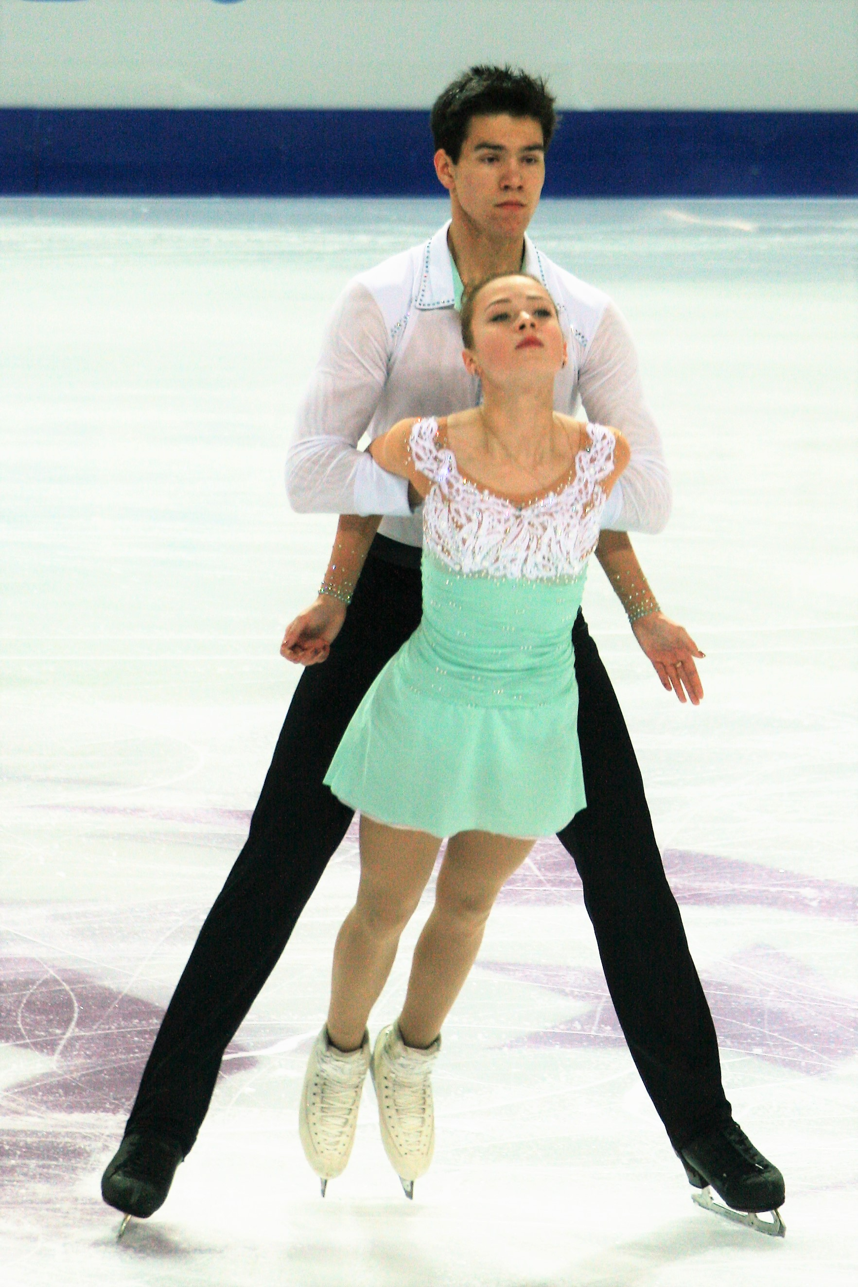 Алина Устимкина / Никита Володин (Россия) на финале Гран-при по фигурному катанию среди юниоров 2016-2017